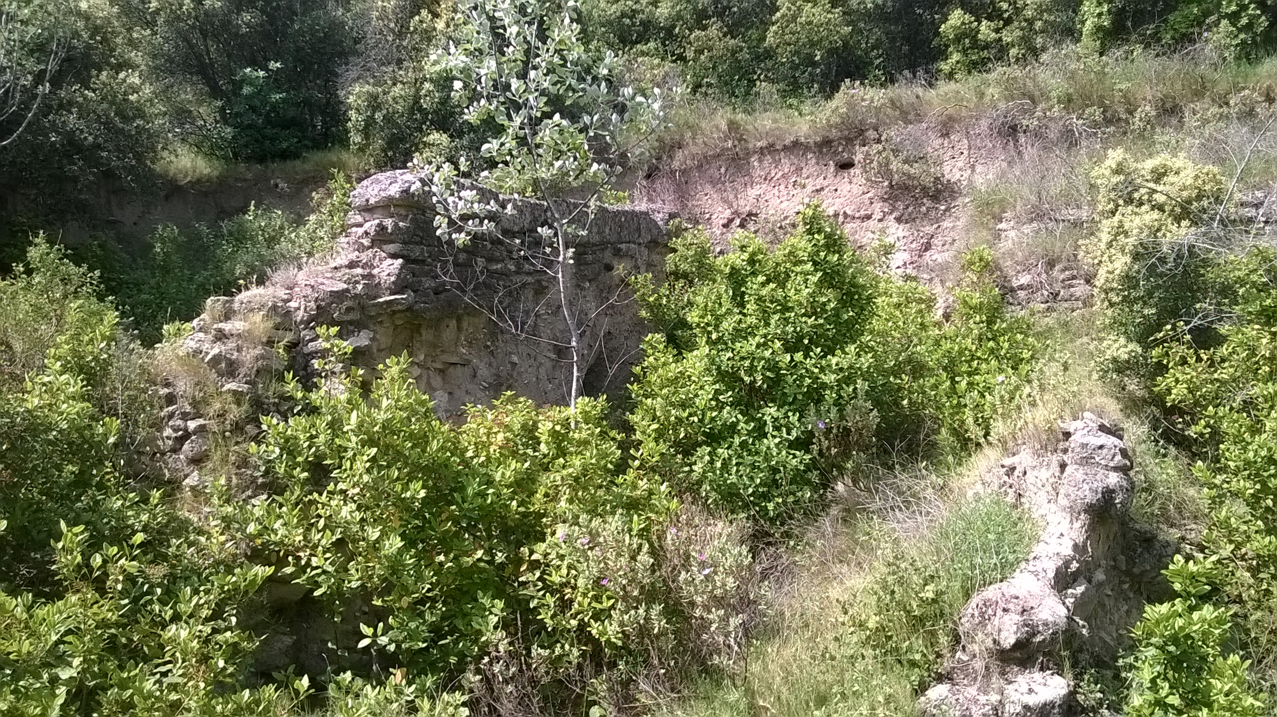 Prise par M. Thomy Mas